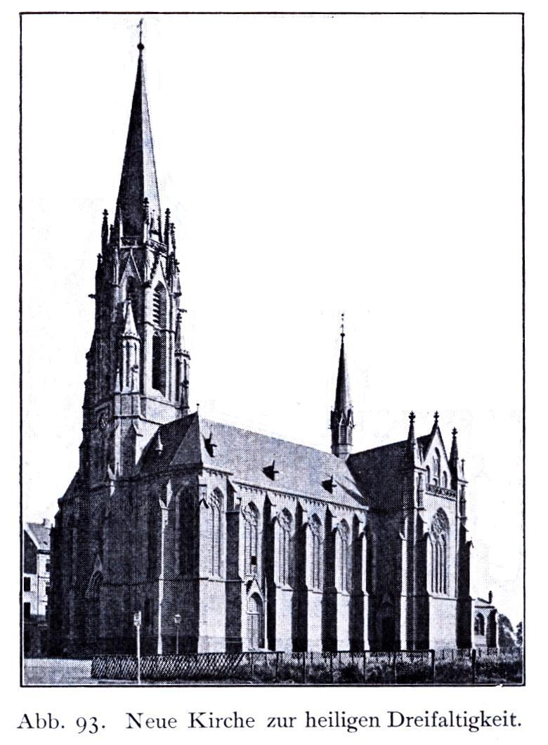 Kirche Heilige Dreifaltigkeit an der Jülicher Straße in Düsseldorf-Derendorf, 1892 bis 1893, Architekt Caspar Clemens Pickel.jpg